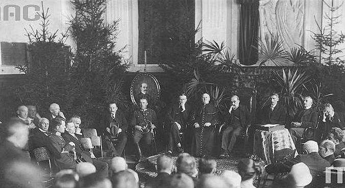 Jubileusz 50-lecia pracy prezesa Sądu Okręgowego w Samborze Józefa Gołkowskiego